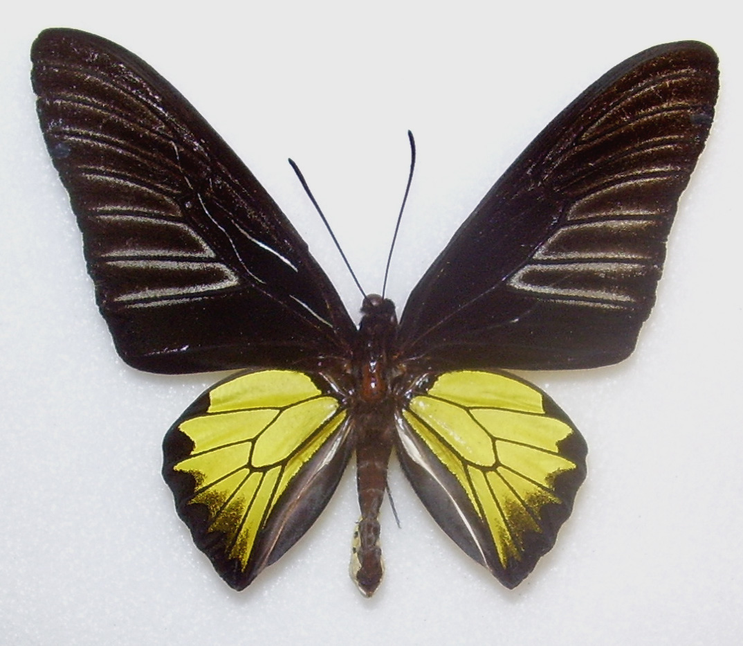 Troides rhadamantus Male upperside